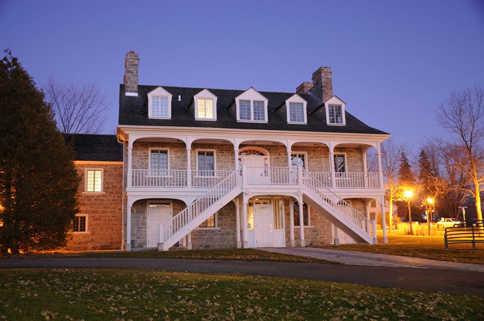 Il s'agit d'une photographie de l'Auberge Symmes en soirée d'Automne prise par moi-même, Philip Whelan.